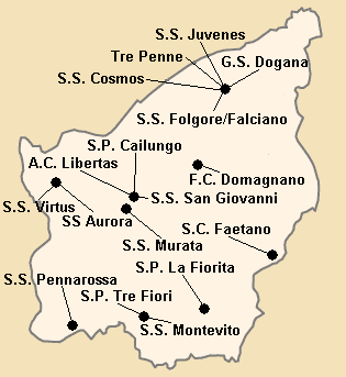 Répartition des clubs en Serie A1 1985-1986.